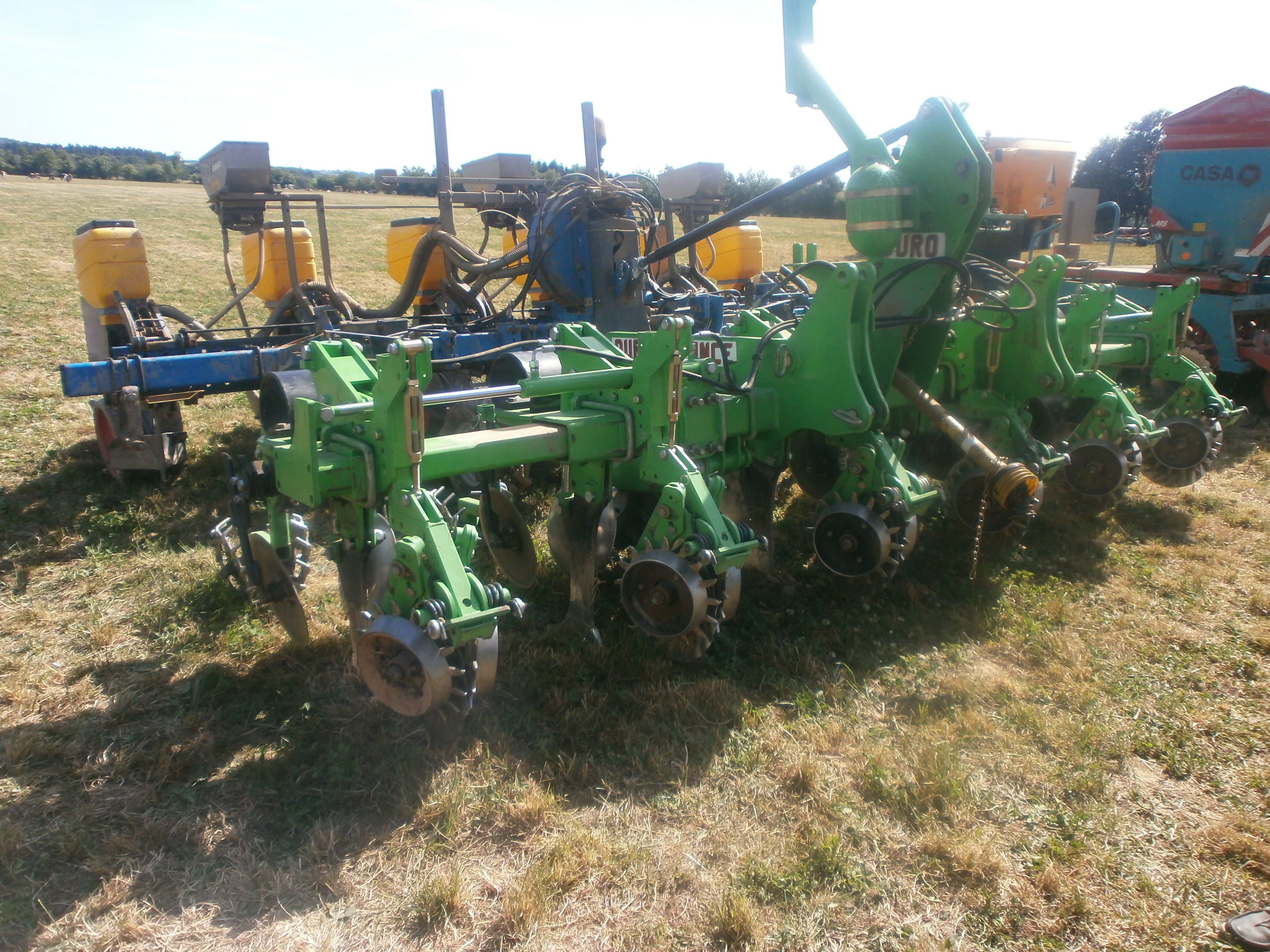 Semoir pour semis simplifié, appelé aussi semoir combiné ou semoir de semis direct. Conçu pour système sans labour.